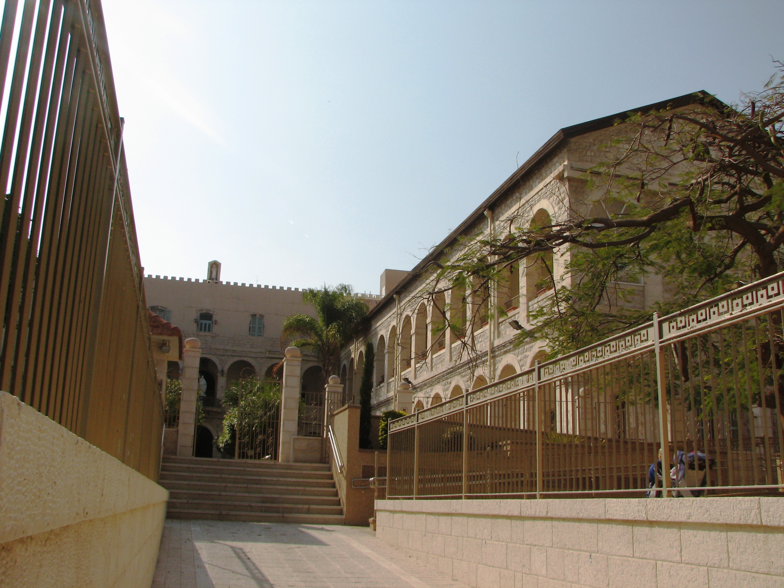 Maison du Sacre – Coeur, Haifa מעון "הלב הקדוש" הוא מעון פנימייתי ציבורי, אשר נוסד בשנת 1976 על ידי נזירות . המעון שוכן ברחוב אלנבי 13 בעיר התחתית של חיפה. המעון נמצא בתוך מבנה מנזר עתיק ויפהפה